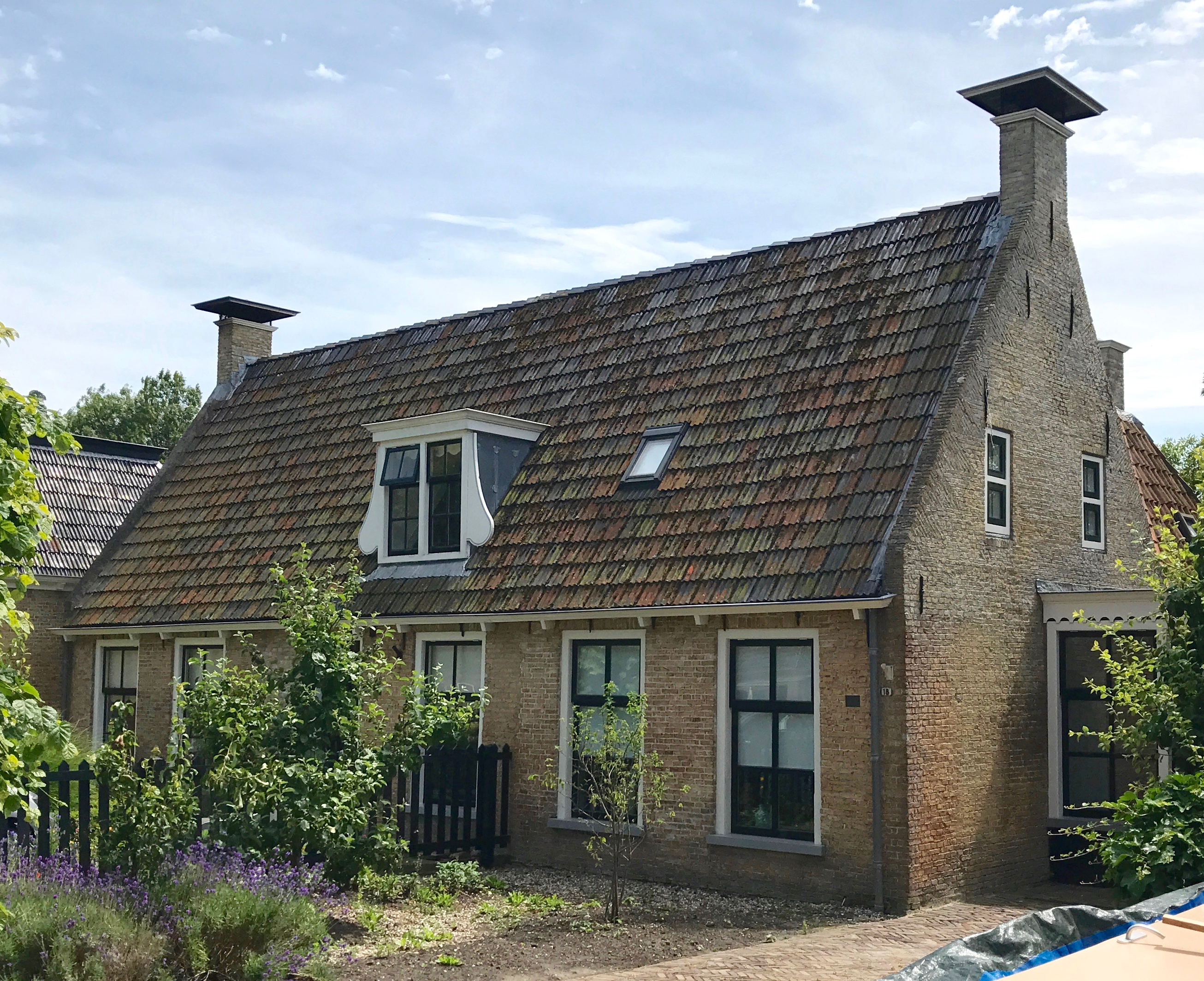 Dorpsstraat 17-18